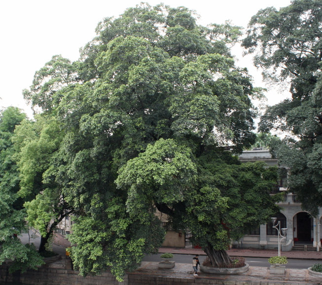 中文（中国大陆）: 拍于广州沙面